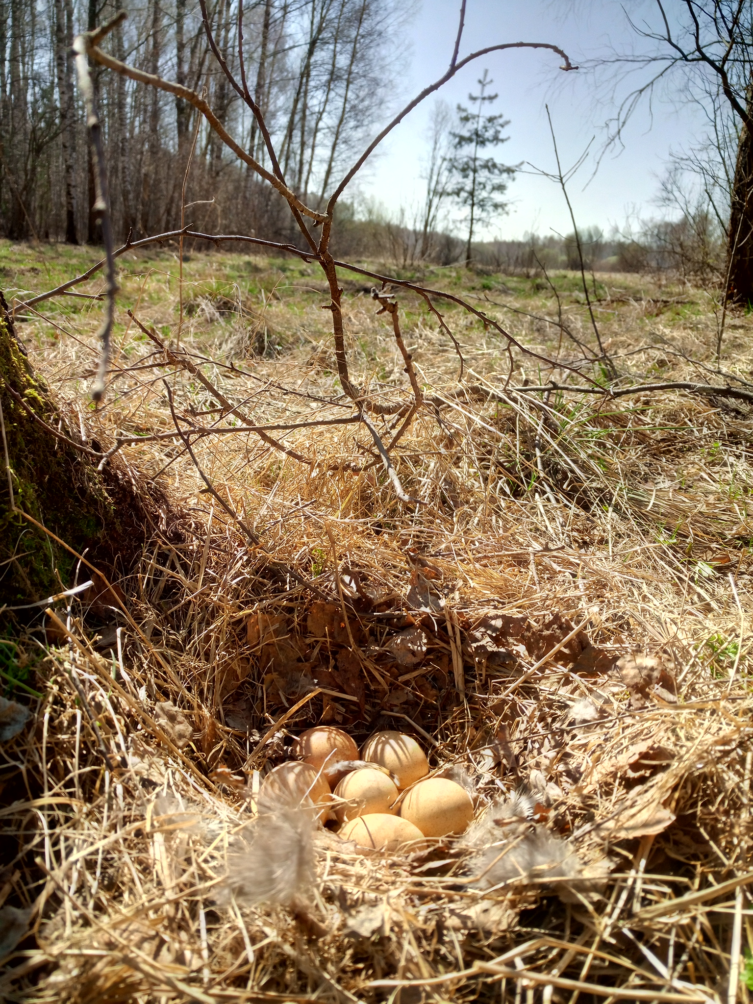 Гнездо глухаря в Петушинском районе Владимирской области. Россия.